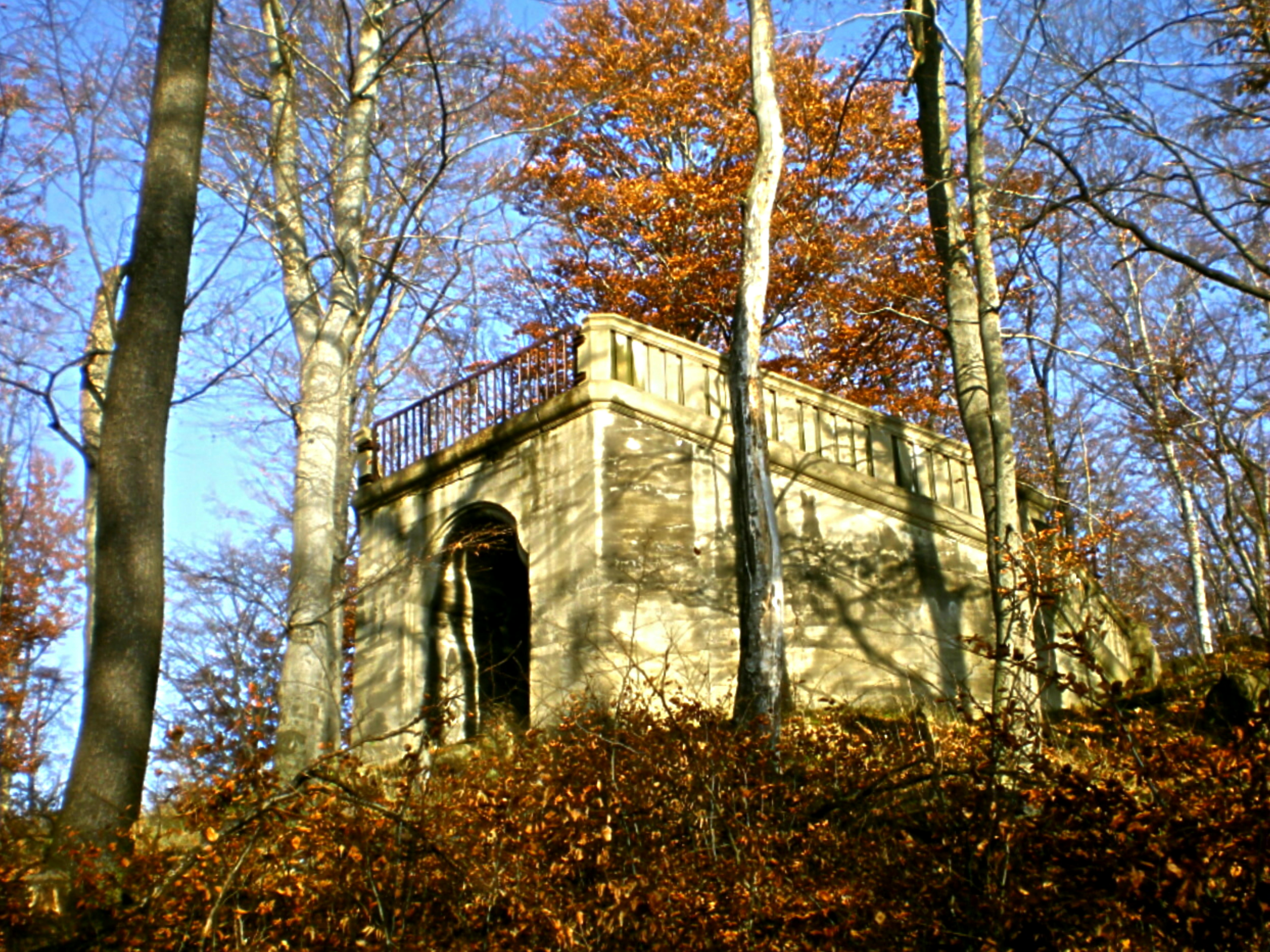 Der Wolfshügelturm war ein Aussichtsturm auf dem 211 m hohen Wolfshügel am Ostrand des Albertparks in der Dresdner Heide. Der 25 Meter hohen Stahlbeton-Turm wurde einst vom Stadtbaurat Hans Erlwein erschaffen. Eine Bürgerinitiative aus Dresden möchte in der Stelle wieder einen Turm bauen.